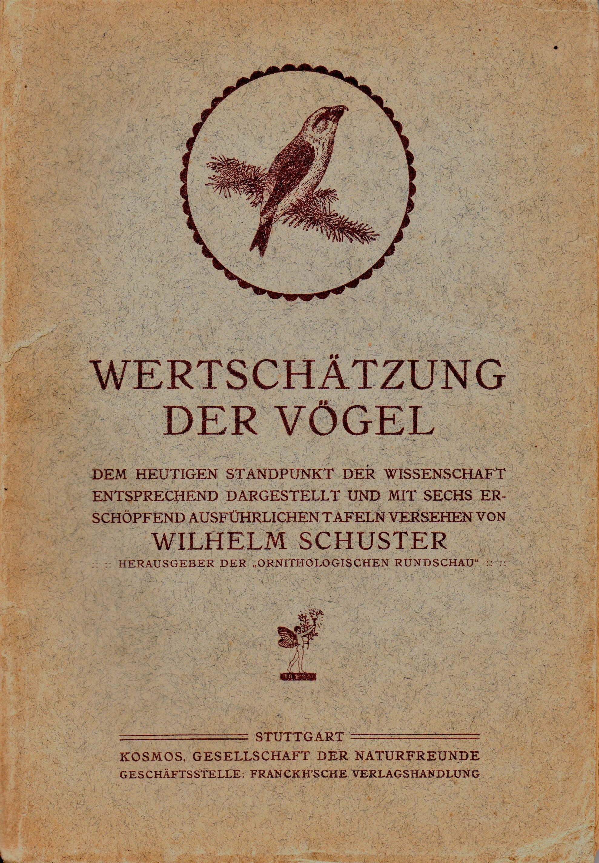 Scan von Wilhelm Schusters: Wertschätzung unserer Vögel, 1906. Erstdruck